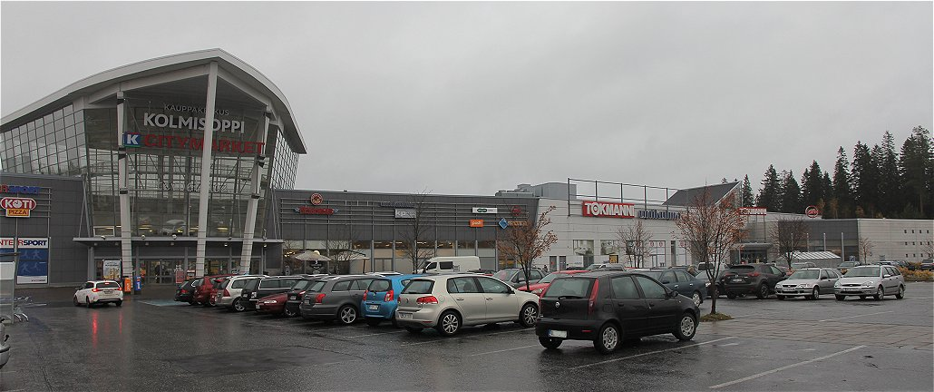 Kauppakeskus Kolmisoppi on suuri kauppakeskus Kuopion Neulalammen kaupunginosassa. Kauppakeskus on saanut nimensä läheisen järven mukaan. Kauppakeskuksen suurin myymälä on hypermarket K-citymarket Kolmisoppi.